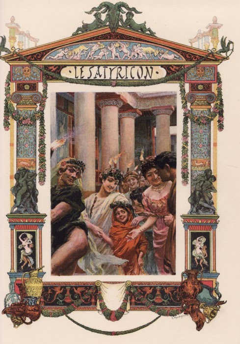 Illustration du Satyricon de Pétrone par Georges-Antoine Rochegrosse : rencontre de Pannychis avec Giton (chapitre XXV).